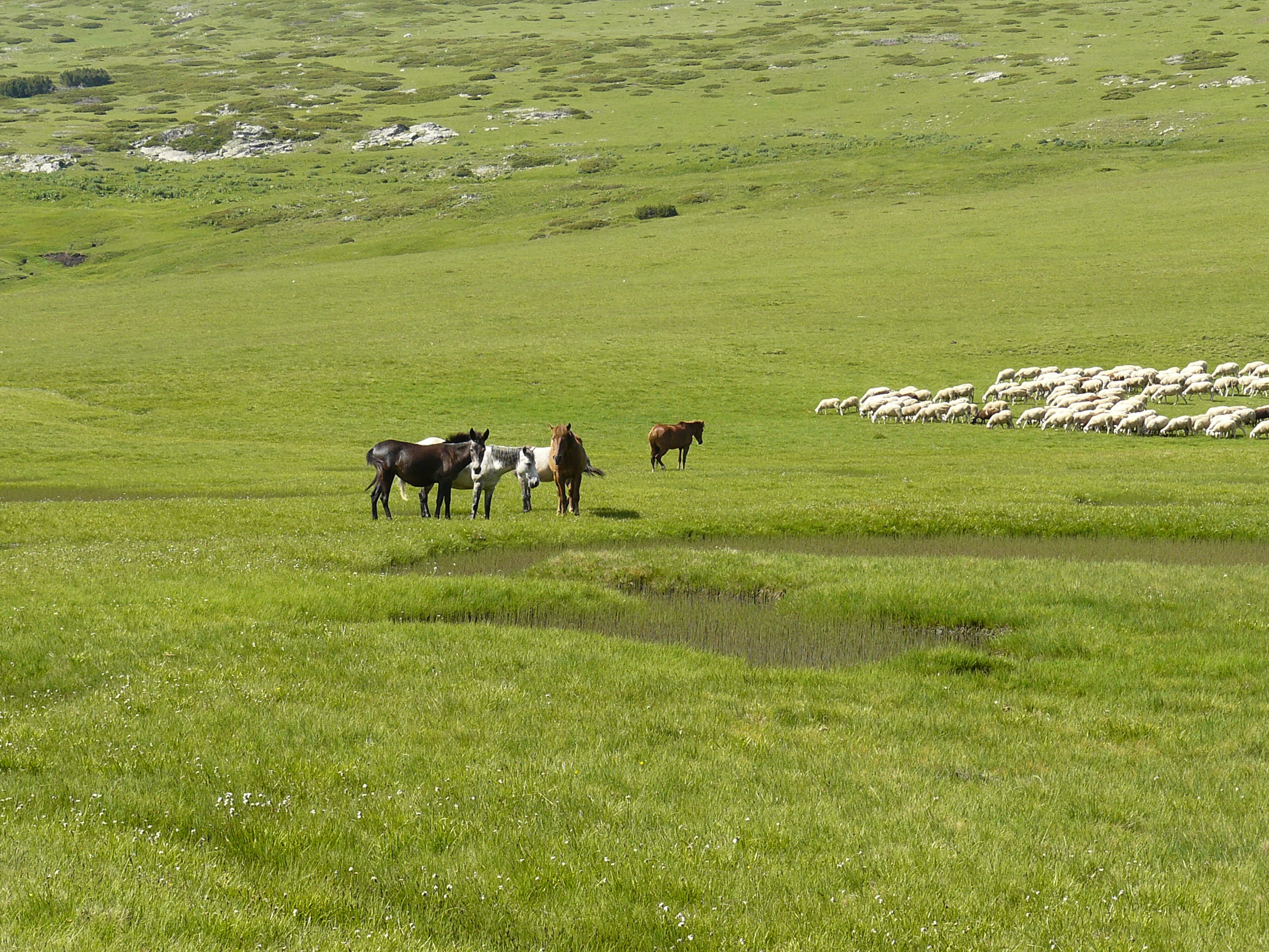 Бегово поле